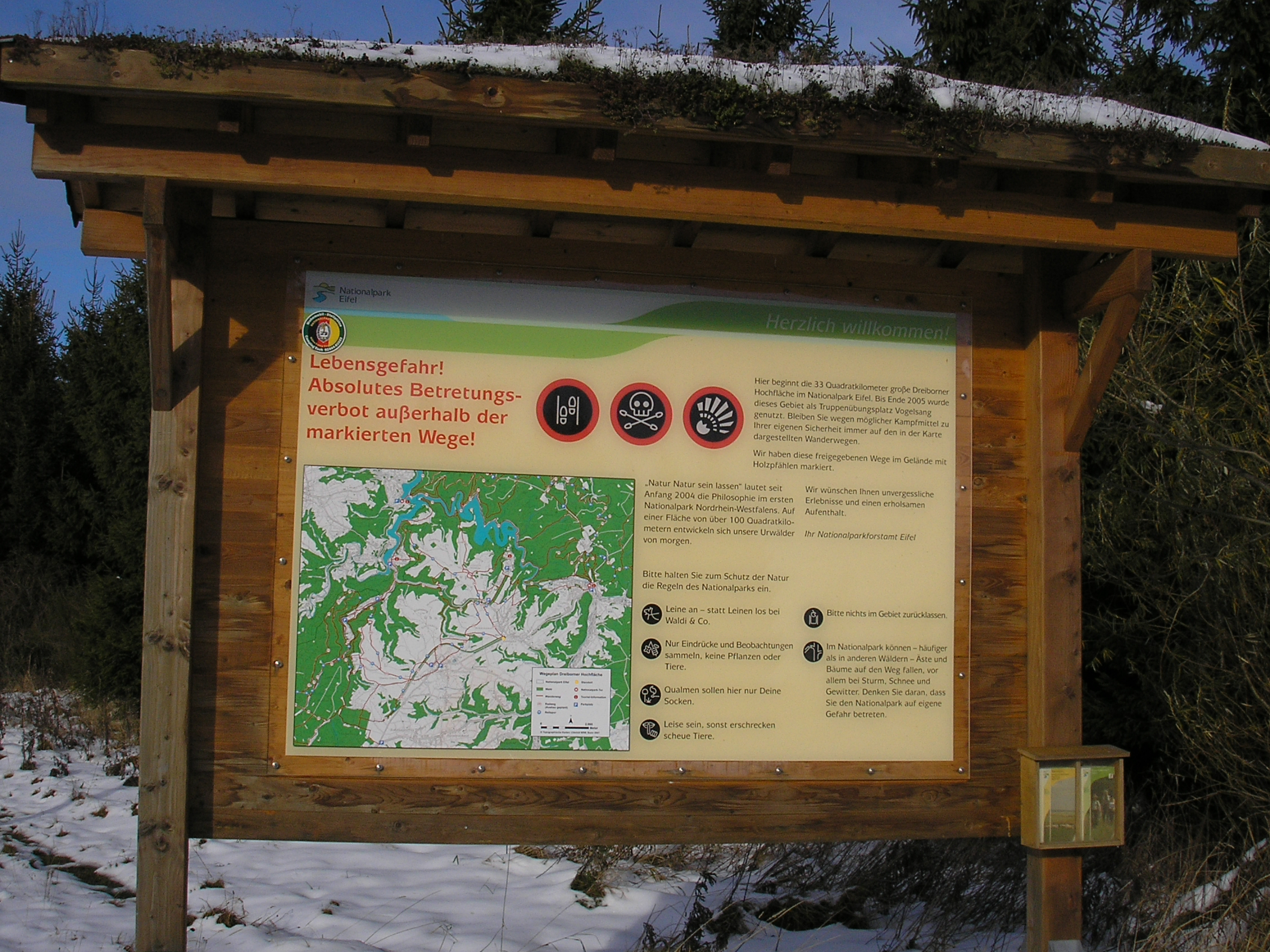 Hinweistafel im Nationalpark Eifel - Dreiborner Hochfläche - ehemaliger Truppenübungsplatz Vogelsang.